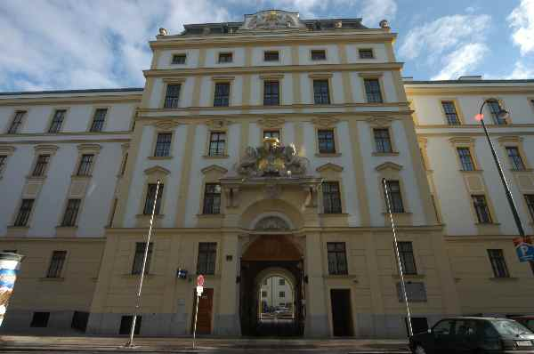 Bildbeschreibung: Stifskaserne (Wien, Stiftgasse) Quelle: GuentherZ Fotograf/Zeichner: GuentherZ Datum: Jänner 2006 andere Versionen